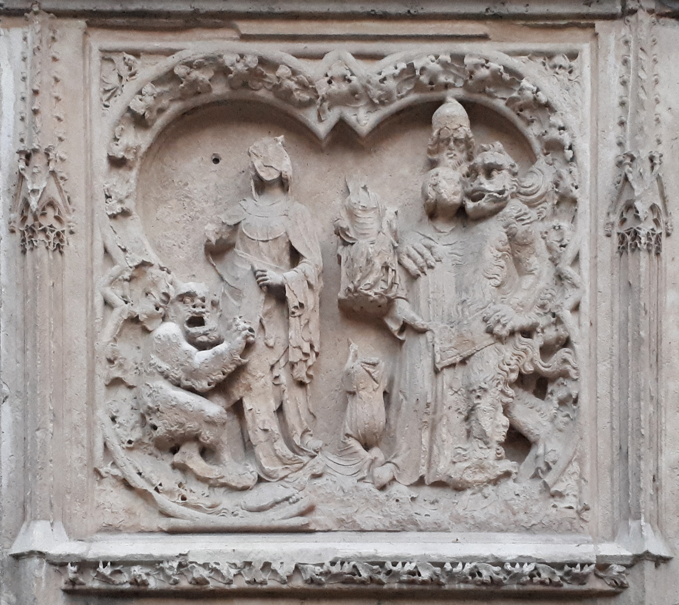 La leggenda di Teofilo.